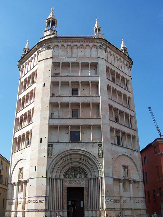 Parma - Battistero